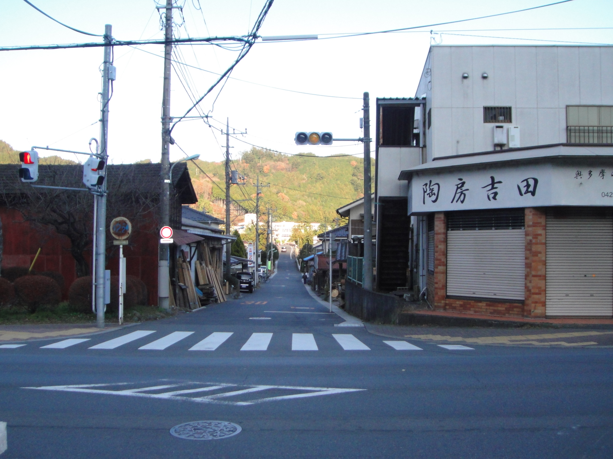 東京都道200号柚木二俣尾線の起点の奥多摩橋南交差点より終点方向を撮影。